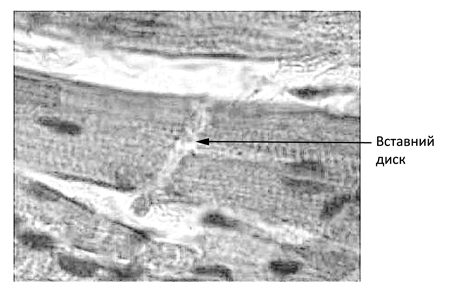 Тканина серцевого м'яза (оптична мікроскопія). Позначений вставний диск